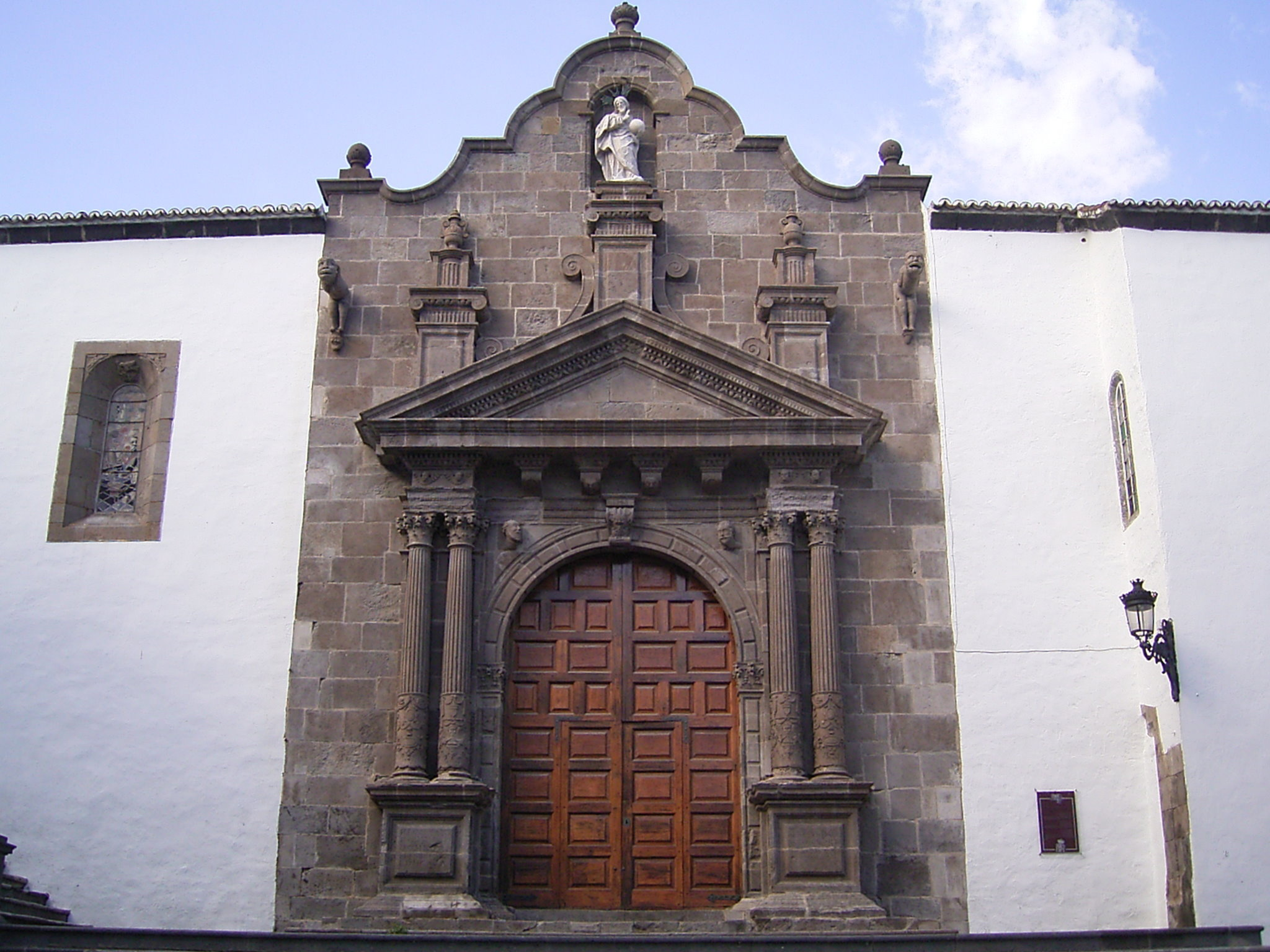 Santa Cruz de La Palma, La Palma, Canary Islands